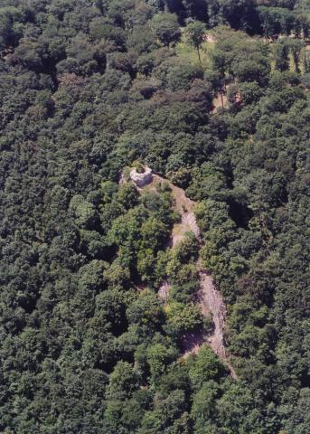 Szilvásvárad Hungary aerialphotography